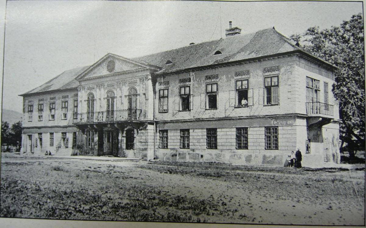 Berchtoldov palác bol postavený 1831, zbúraný 1981.